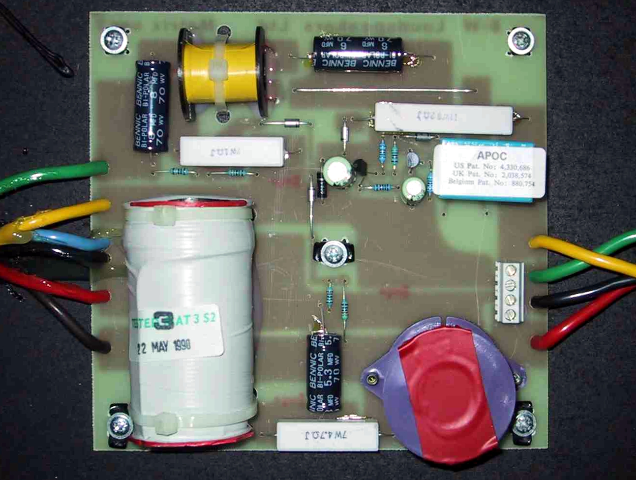 Lizenz: Public Domain Quelle: Günther Nubert (Nubert Speaker Factory), freigegeben zur Veröffentlichung Aufnahmedatum: unbekannt